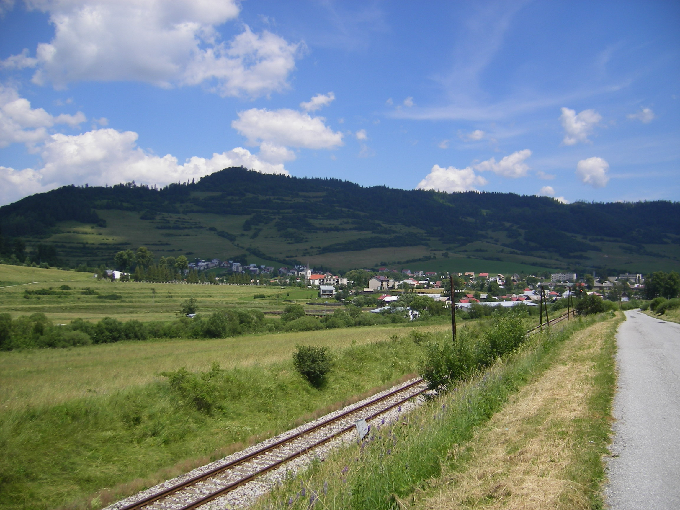 Nálepkovo (GL), view from west